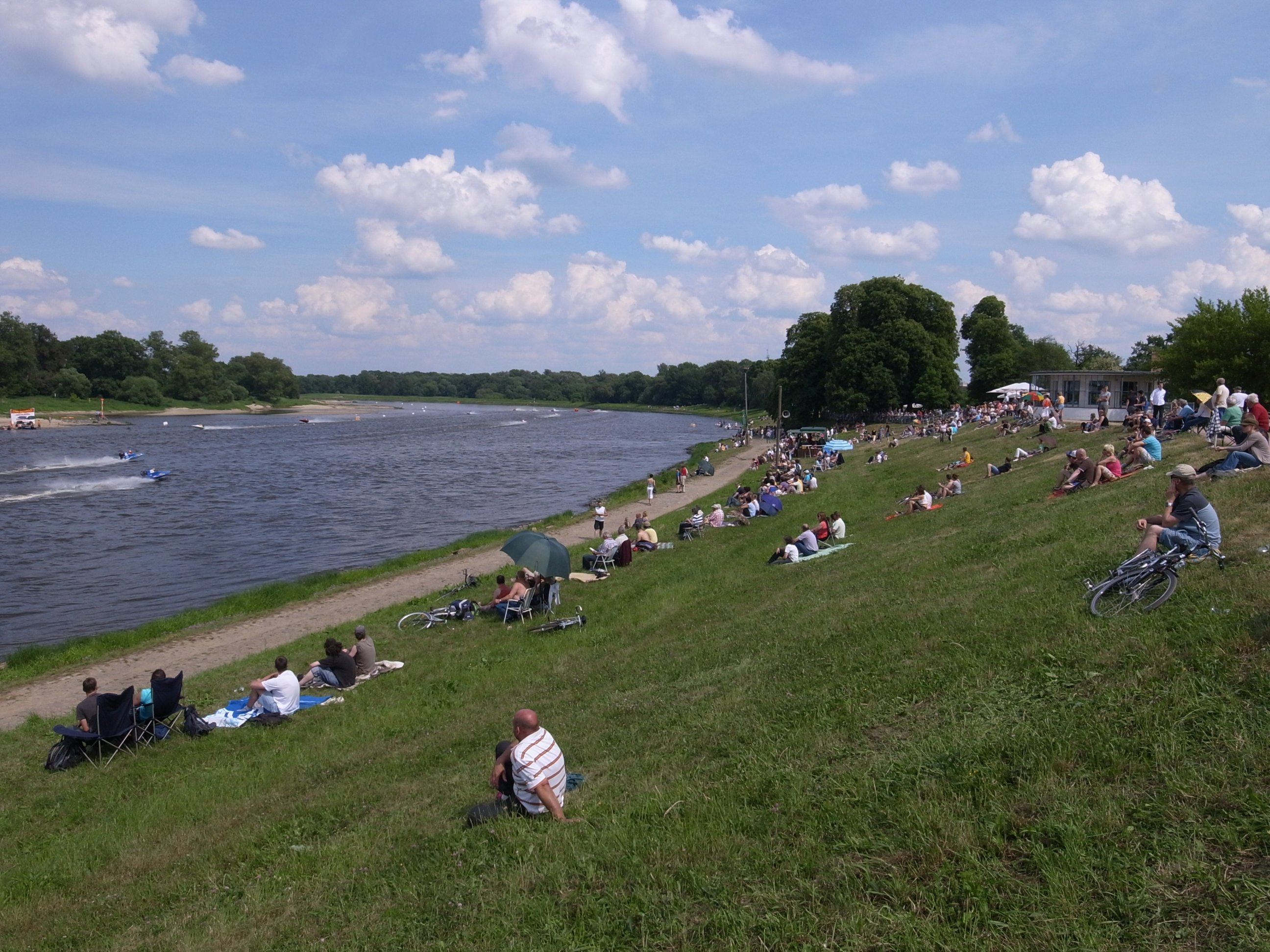 Dessauer Kornhaus, Publikum am Kornhaus. Das Rennen ist frei zugänglich, die Parkmöglichkeiten sind begrenzt, die Anfahrt mit Fahrrad ist Ideal da zwischen Kornhaus und Elbe ein gut ausgebauter Radfernwanderweg liegt